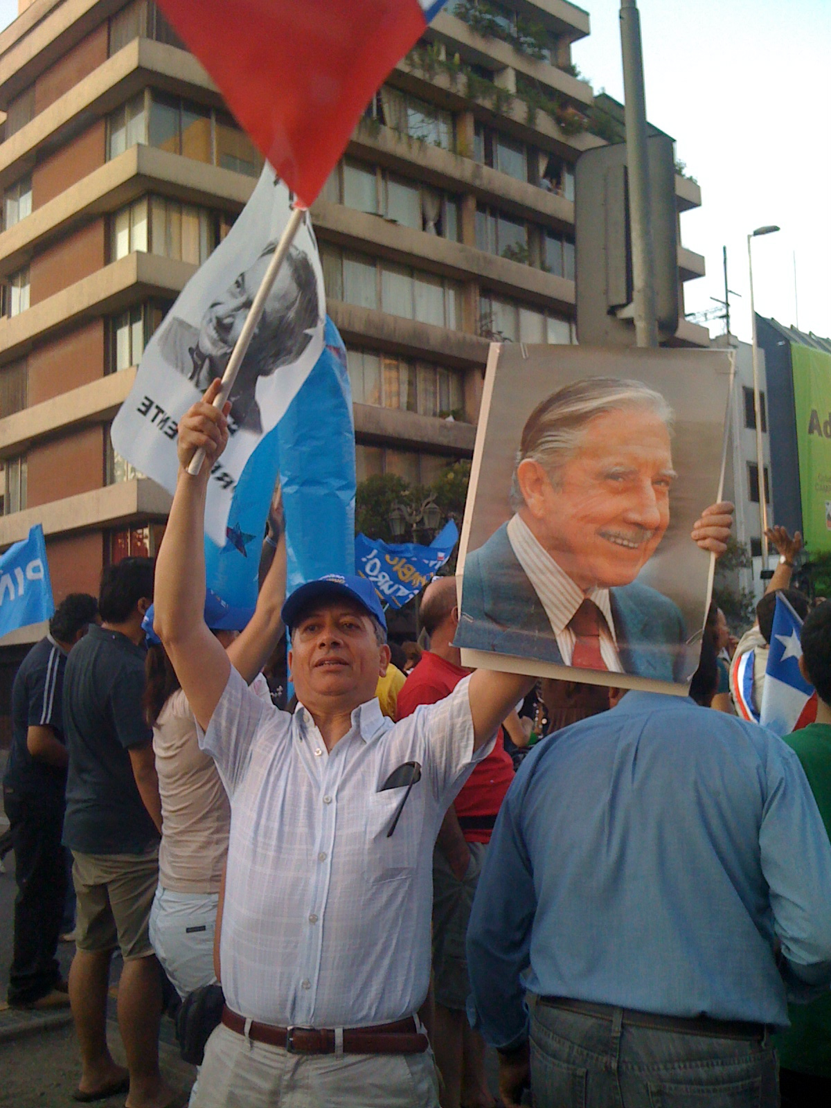 En las celebraciones de la victoria de Sebastian Piñera en la segunda vuelta presidencial de 2010, un partidario sostiene una fotografía de Augusto Pinochet.